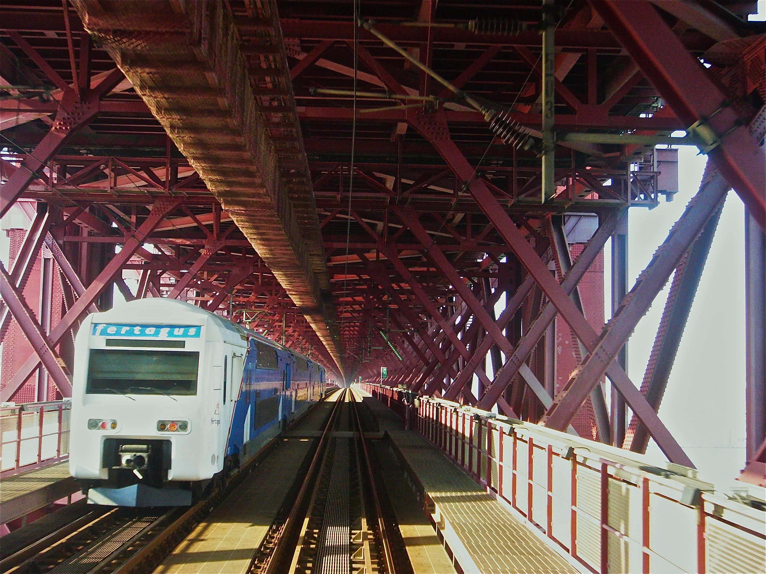 Travessia ferroviária na Ponte 25 de Abril.